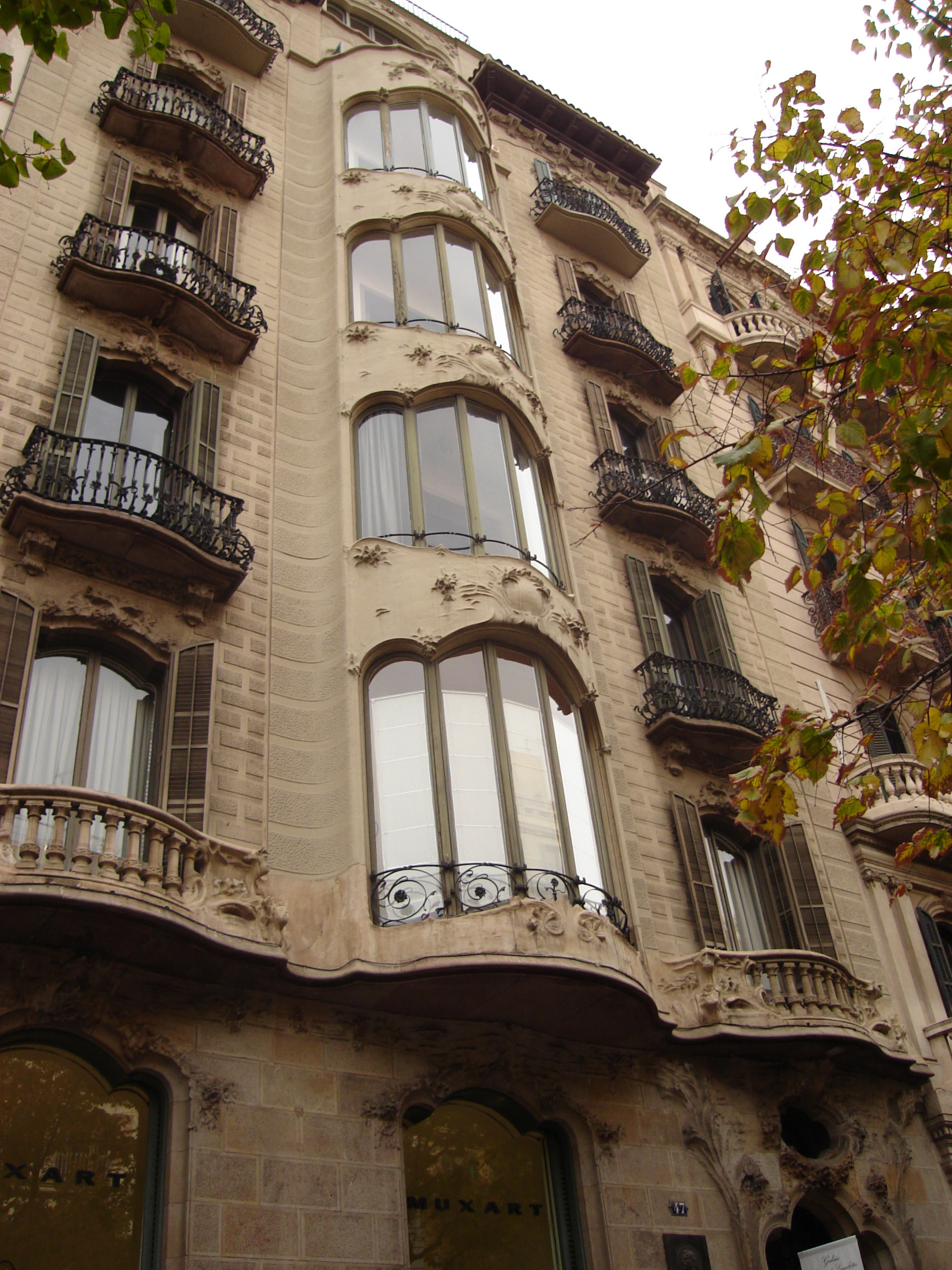 Casa Fargas, Rambla de Catalunya, 47, Barcelona, by Enric Sagnier (1902-4)